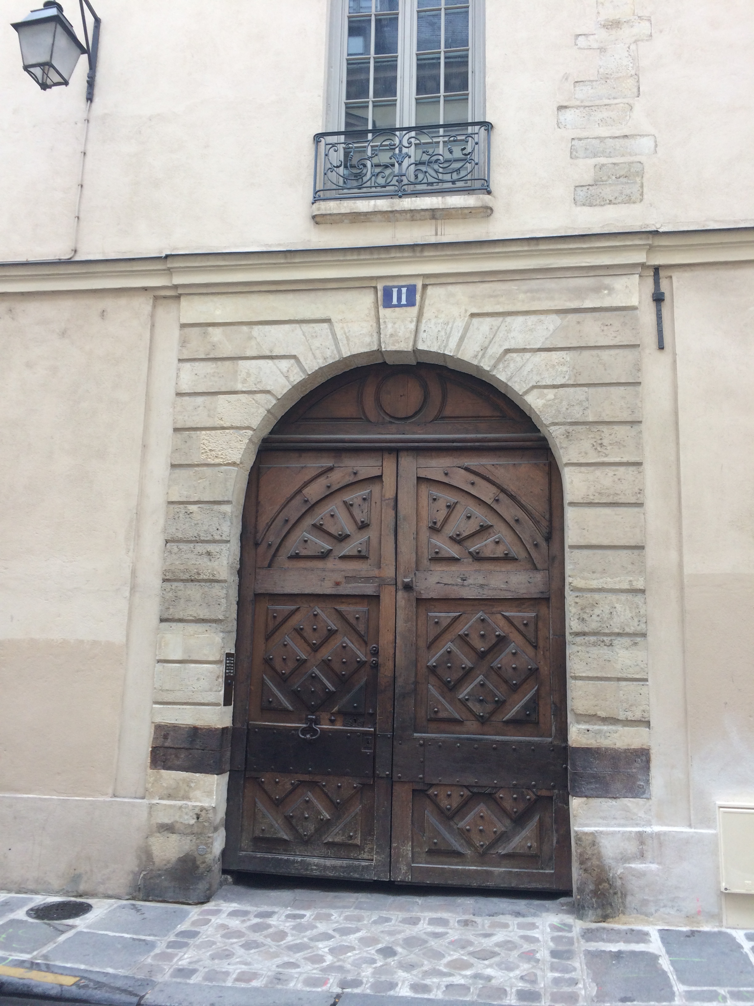 Photographie du 11, rue des Lions Saint Paul à Paris 4ème arr.